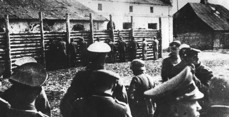 Egzekucja Polaków przez Niemców podczas II wojny światowej w Gostyninie.